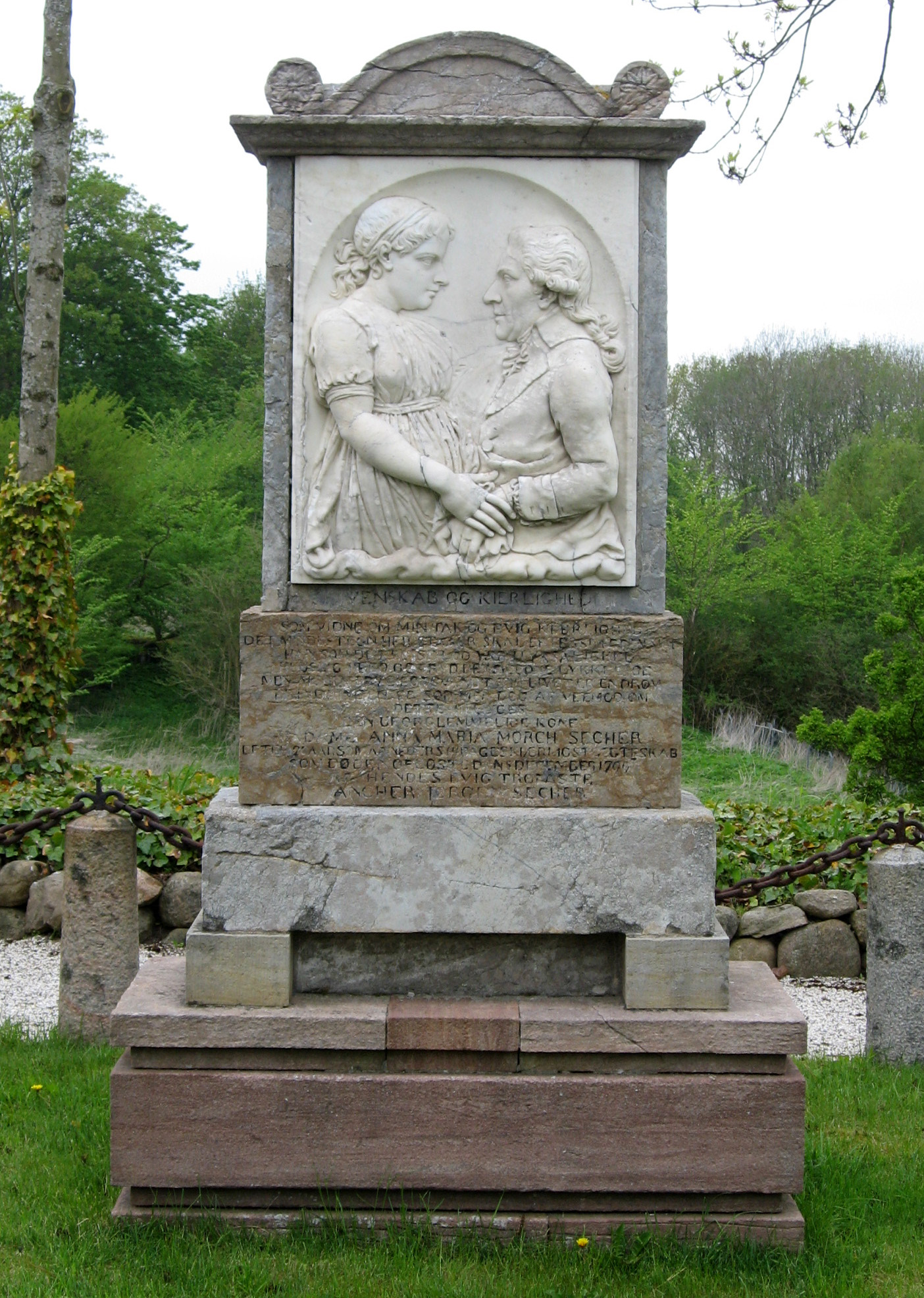 Kasted Kirke in Kasted Sogn, Århus Kommune, Denmark.